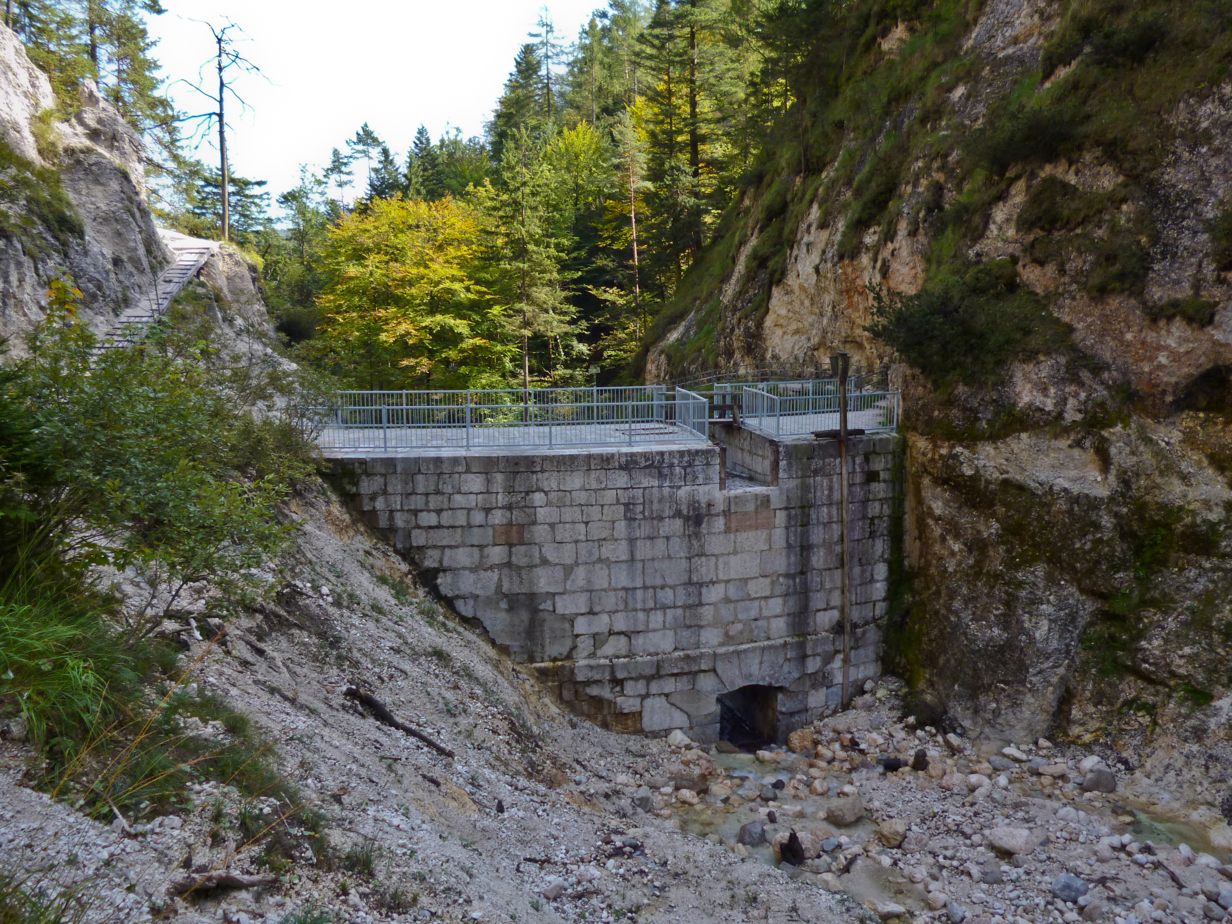 Die Theresienklause in der Almbachklamm (Stauseite)